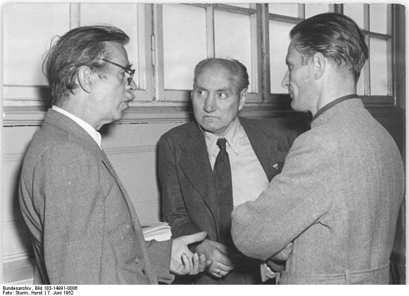 Berlin, II. VBK-Kongress, Nagel, Fischer Zentralbild Sturm 7.6.1952 II. Kongress der deutschen bildenden Künstler 7.6.-9.6. eröffnet. Am 7.6.52.wurde in der Akademie der Künste in Berlin der II. Kongress der deutschen bildenden Künstler eröffnet. UBz: Prof. [Otto] Nagel (li.) im Gespräch mit Oskar Fischer (Mitte) von der Staatlichen Kommssion für Kunstangelegenheiten und einem weiteren Tagungsteilnehmer. Abgebildete Personen: Nagel, Otto Prof.: Maler, Präsident der Akademie der Künste (AdK), Nationalpreisträger, Vaterländischer Verdienstorden (VVO) in Gold, DDR (GND 118586300)